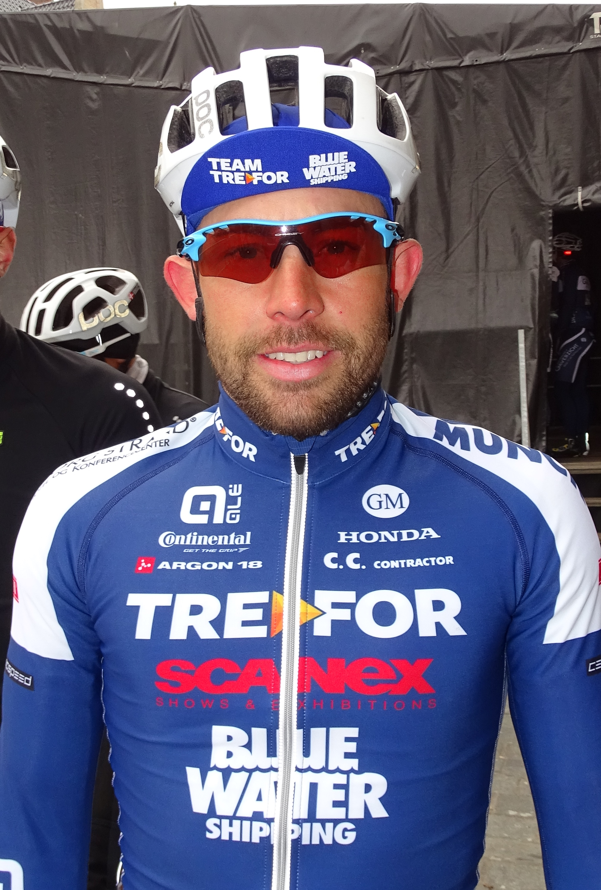 Reportage réalisé le dimanche 15 mars à l'occasion du départ et de l'arrivée de la Course des chats 2015 à Ypres, Belgique.